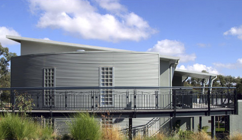 Департамент образования